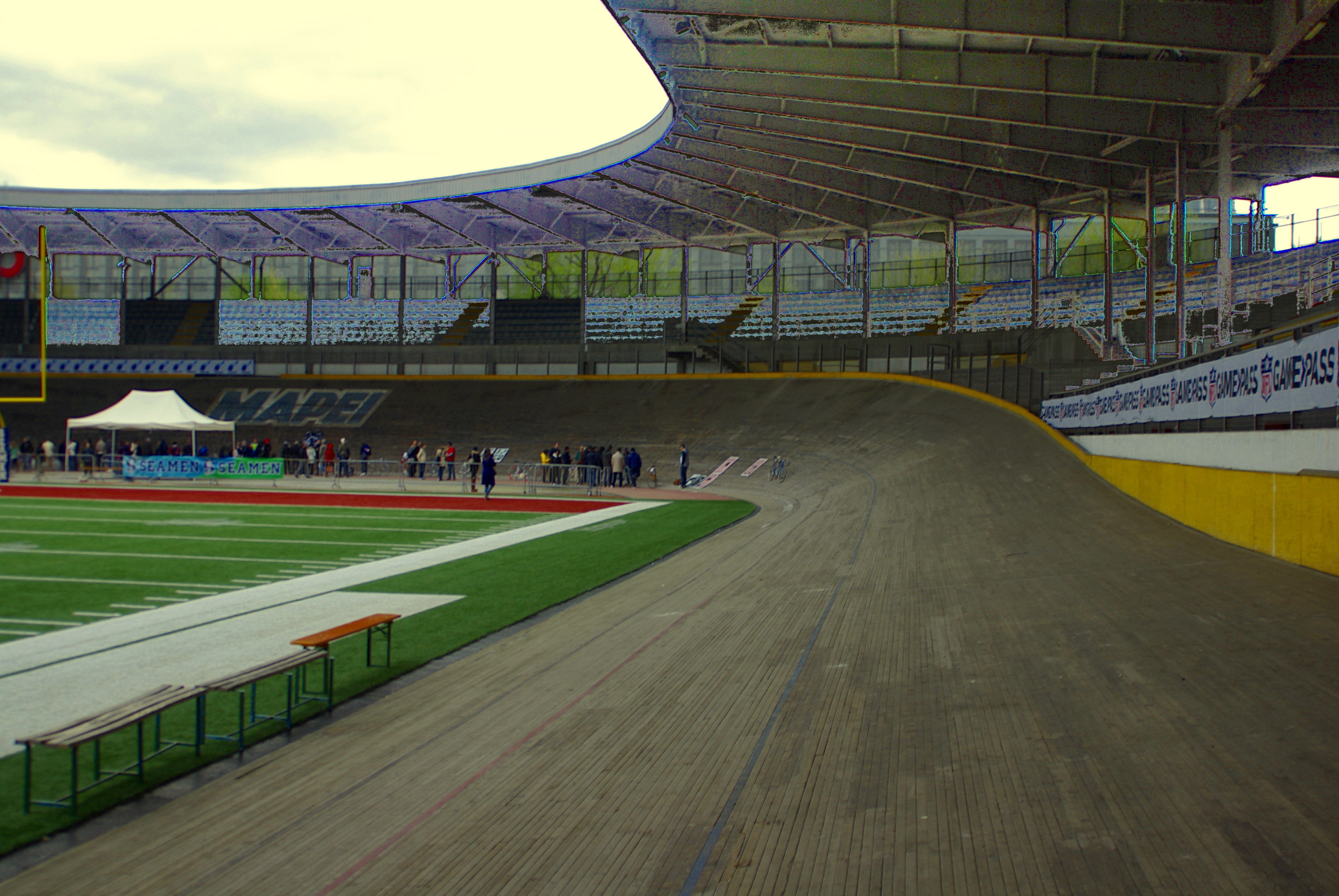 Interno velodromo Vigorelli Milano